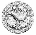 Bygdeå sockensigill, avbildning från Bygdeå kyrkas prediksstol.